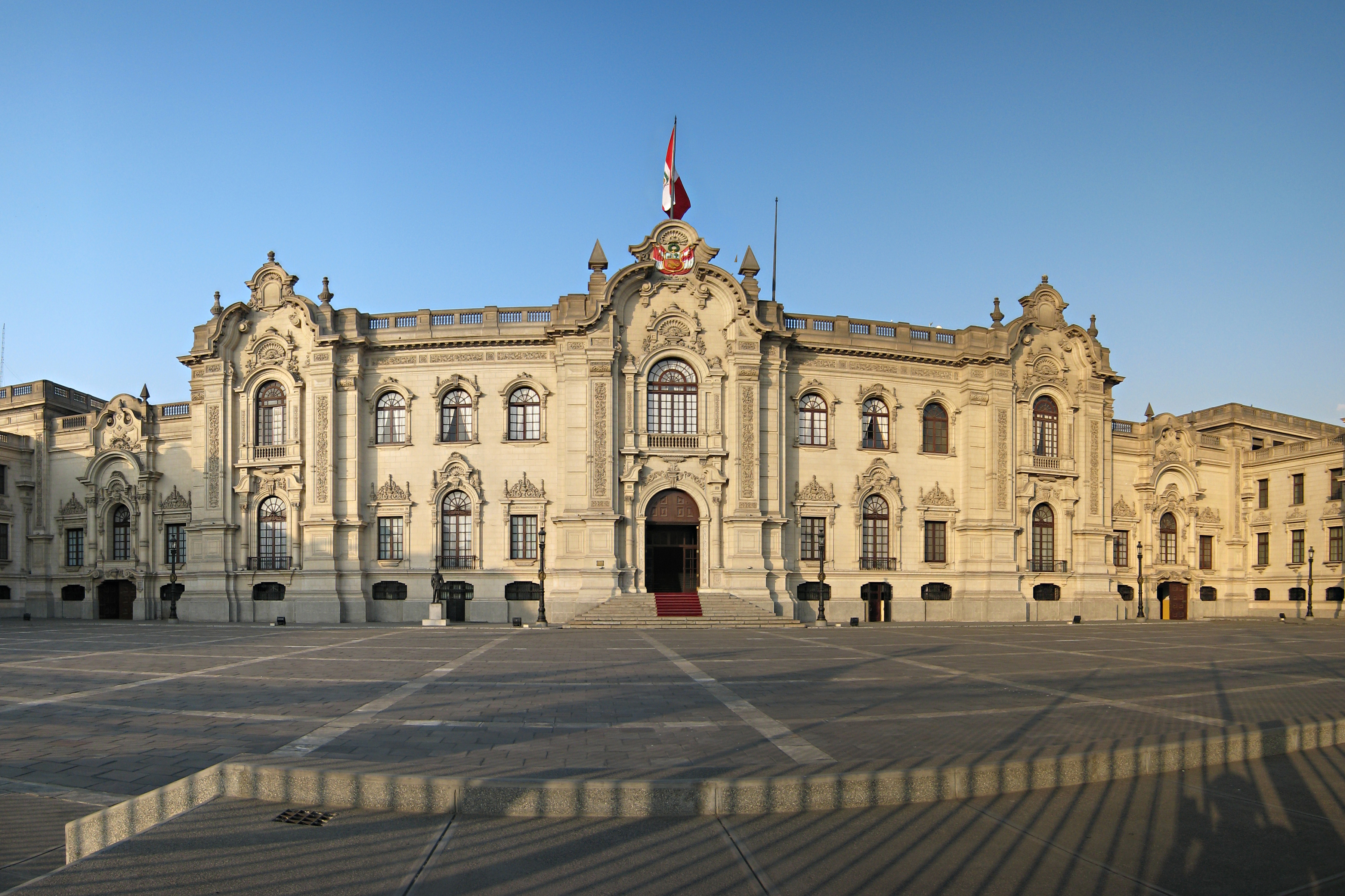 Palacio Ejecutivo del Peru